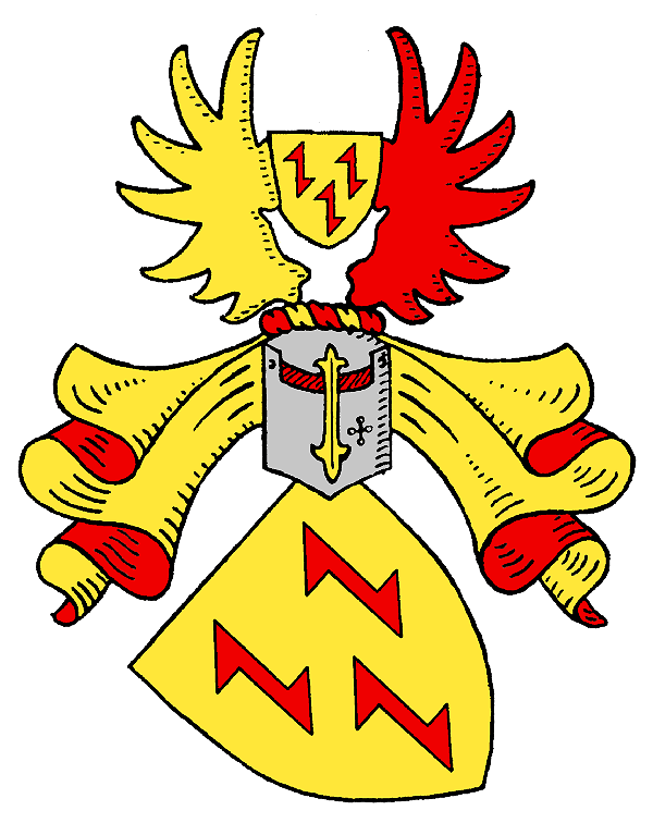 Stammwappen derer von Galen